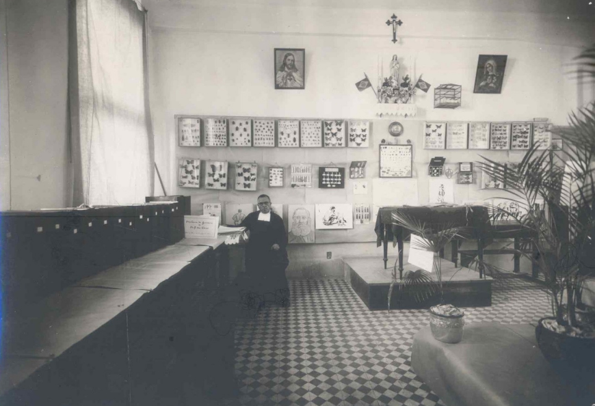 Sala de Biologia do Colégio do Carmo em Caxias do Sul.